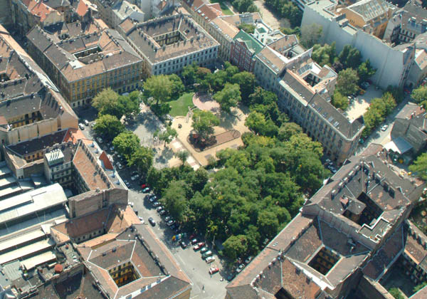 Klauzál tér, Budapest - légi fotó